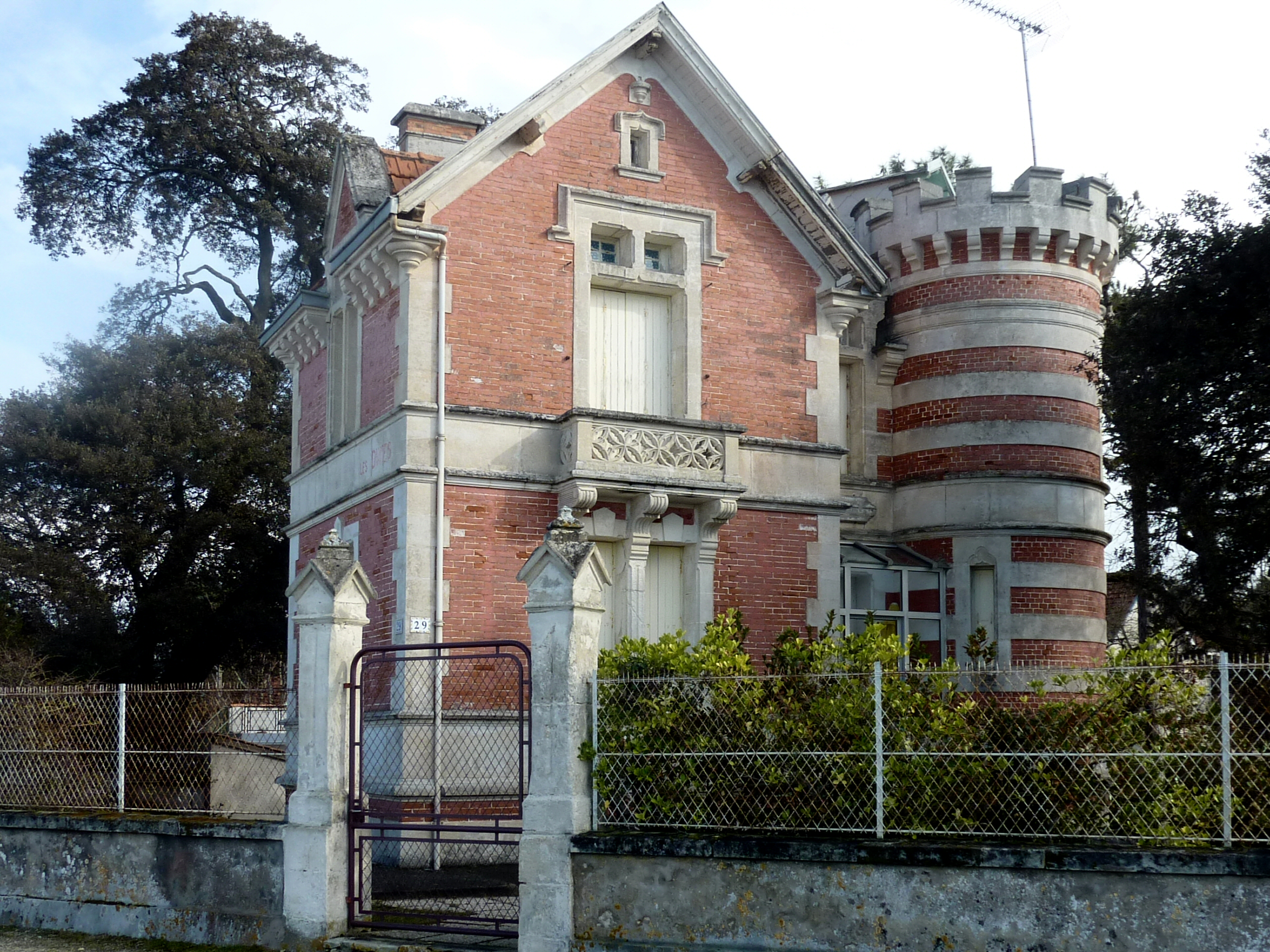 Villa du début du 20ème siècle Fouras Charente Maritime France